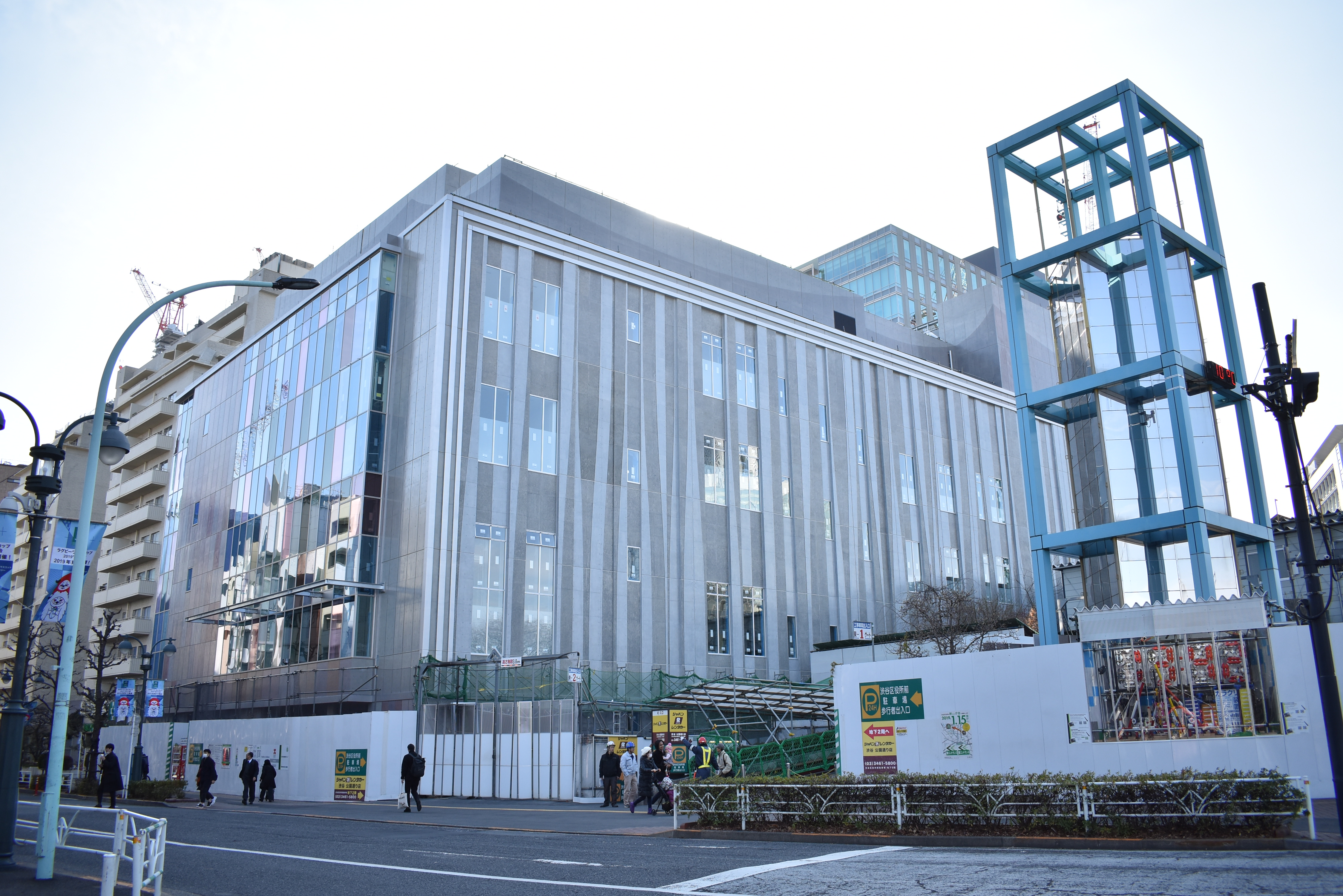 渋谷区役所